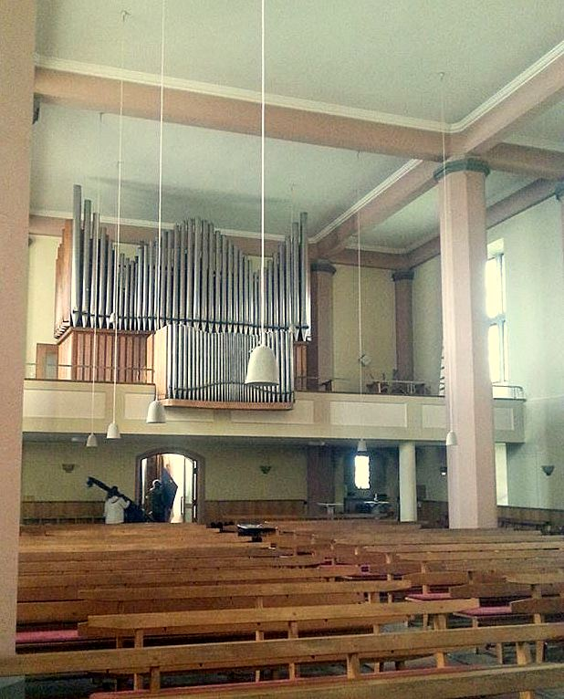 Inneres der Evangelischen Kirche Saarbrücken-Malstatt